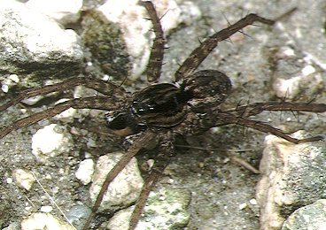 male Pardosa pseudoannulata from Okinawa.